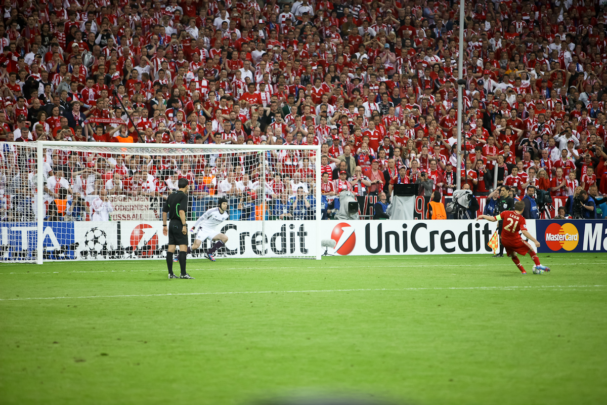 RA1_6361